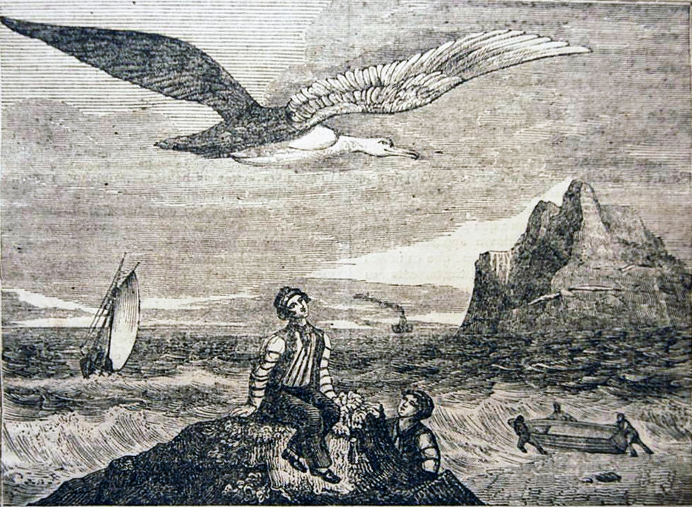 Albatroz "Woodcut" print